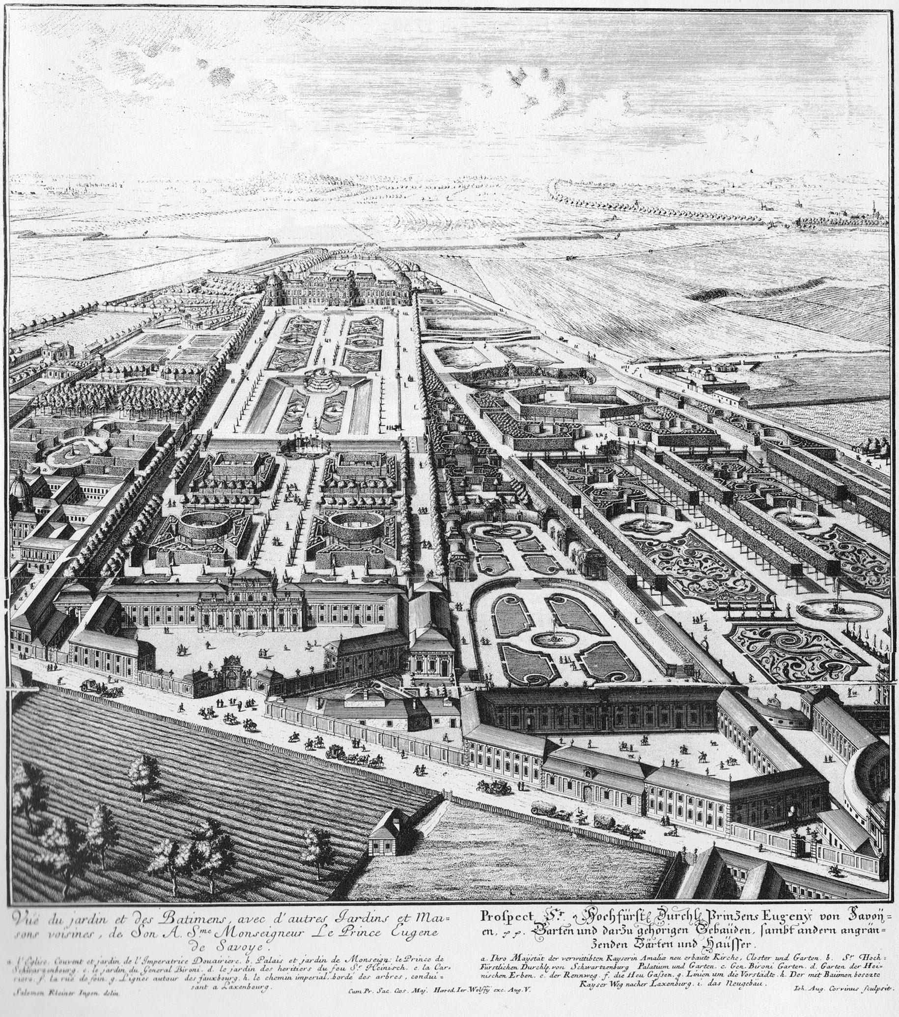 Das Schloss Belvedere und seine Gartenanlage aus der Vogelschau. Rechts ist ein Teil des Schwarzenberg-Gartens zu sehen, links teilweise die Gartenanlage des Salesianerinnen-Klosters.